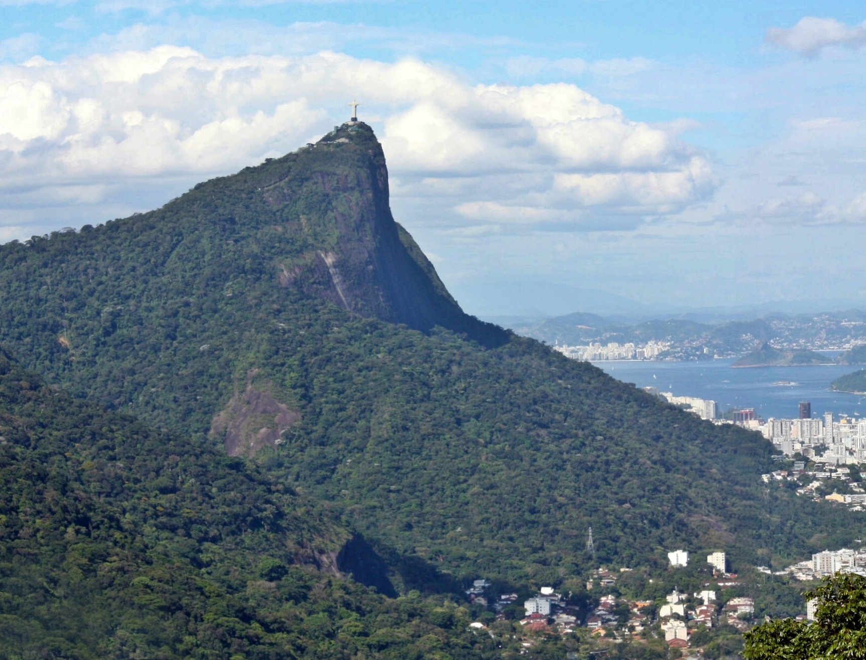 Panorama da cidade do Rio de Janeiro com destaque para as montanhas do Corcovado (esquerda), Pão de Açúcar (centro, ao fundo) e Dois Irmãos (direita).